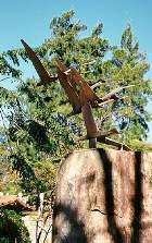 Monumento em homenagem ao cinquentenário da chegada dos primeiros finlandeses ao distrito de Penedo, Itatiaia, Rio de Janeiro, Brasil.